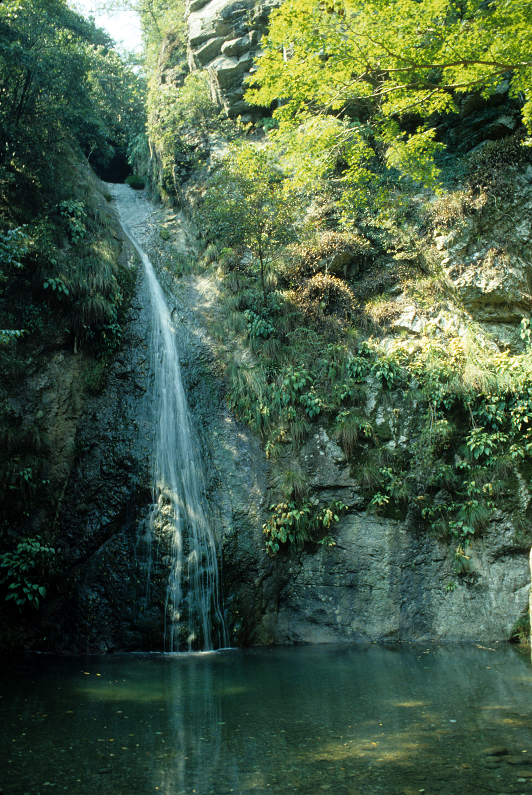 午尾の滝